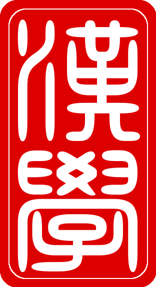 A "sinológia" jelentésű kínai hanxue (漢學) kifejezés pecsétírásos formája